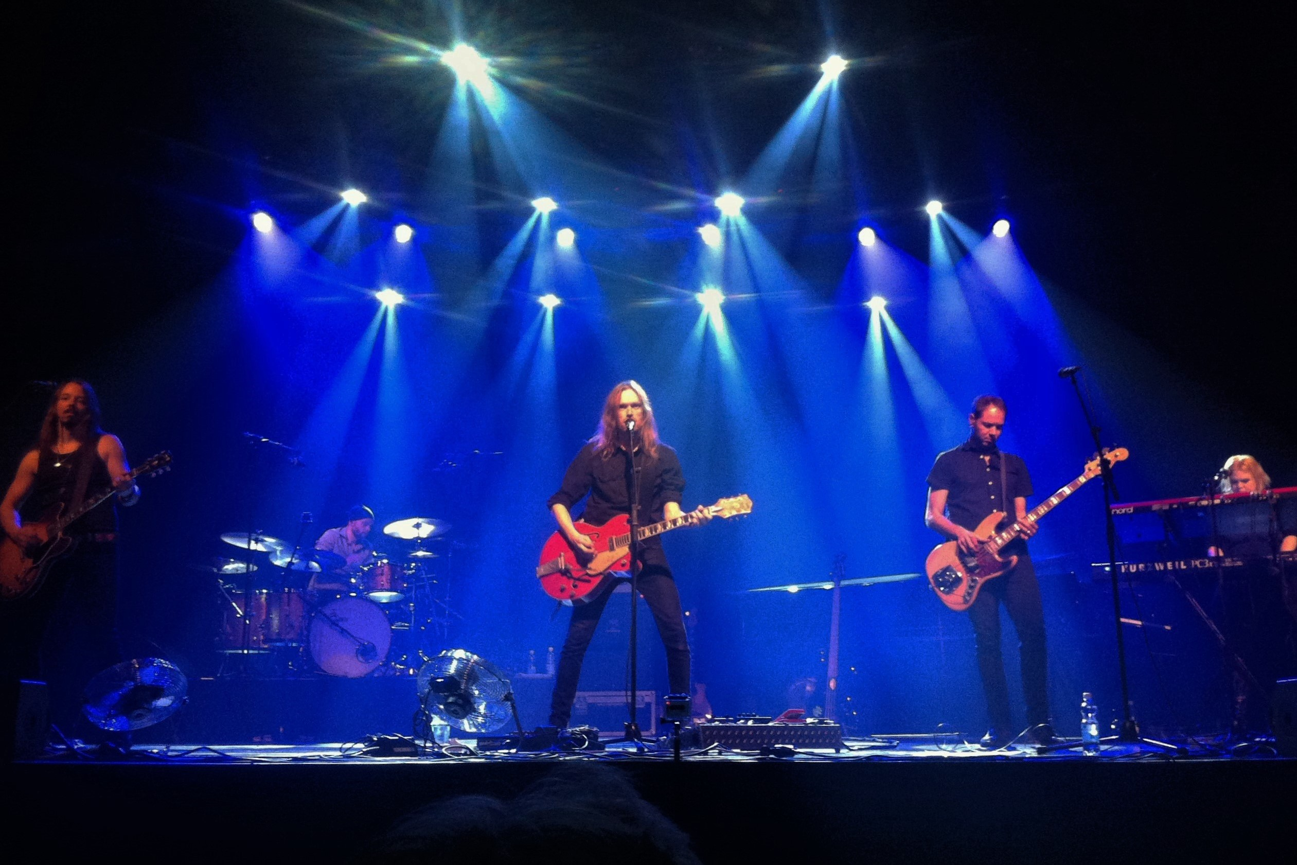 Anssi Kela esiintymässä yhtyeineen Helsingin Savoy-teatterissa 5. marraskuuta 2014.